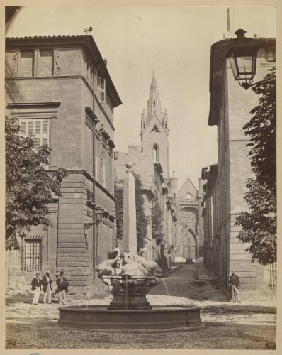 Rue Cardinale (Aix-en-Provence), vue depuis la place des Quatre-Dauphins. Entre 1860 et 1879. Don de Claude Gondran à la municipalité, Bibliothèque Méjanes, Aix.